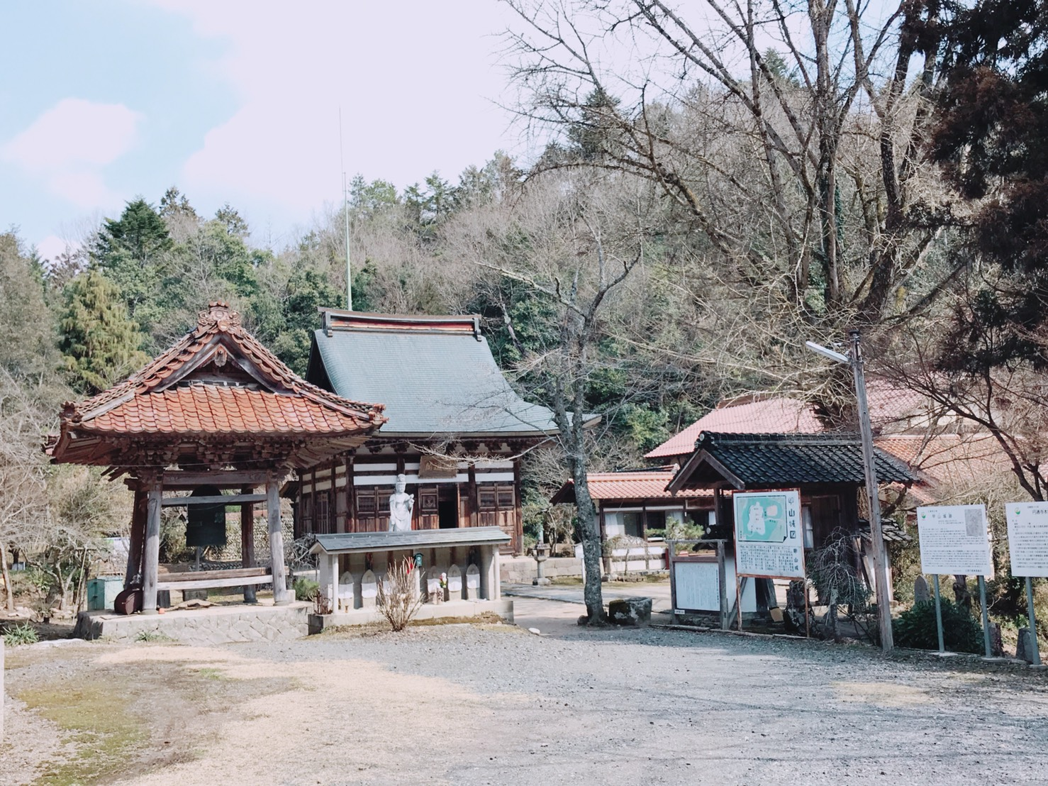 広島県庄原市に所在する円通寺の外観。